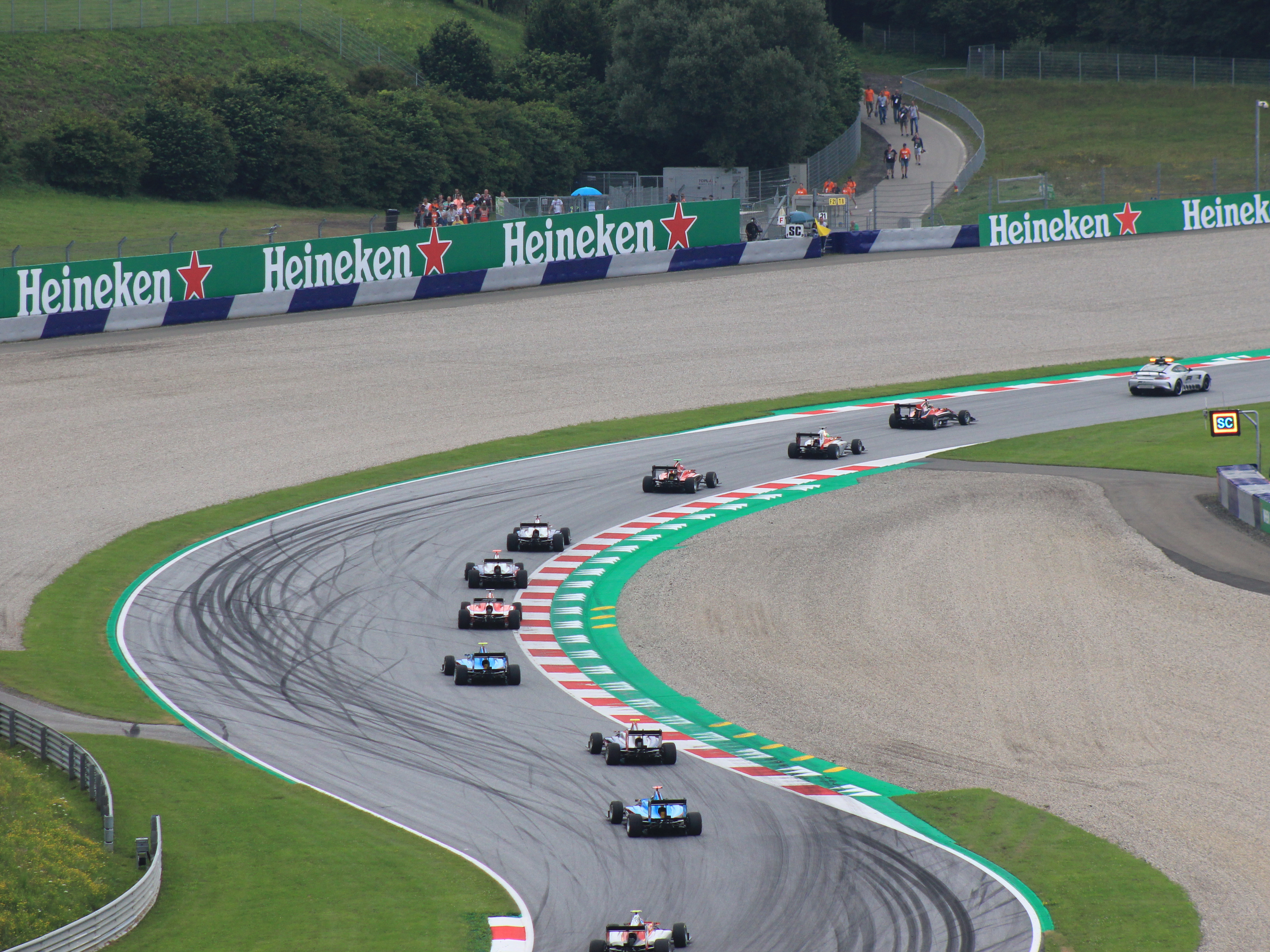 Das Feld hinter dem Safety-Car nachdem Mawsons Rennwagen noch nicht geborgen wurde